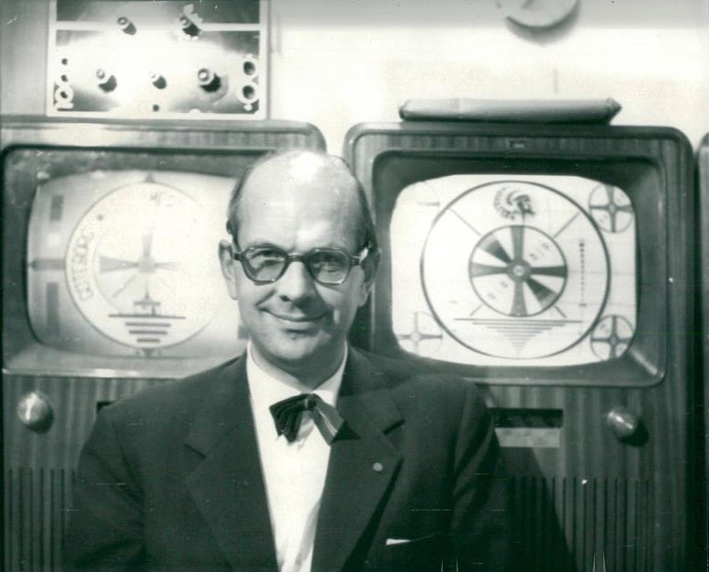 Radiochefen i Göteborg Nils Dahlbeck. Bilden finns återgiven i Svenska Dagbladet 1972-10-13 sid 23.